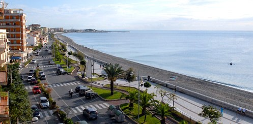 Lungomare di Catanzaro